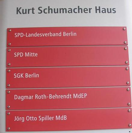 Schrifttafel Kurt-Schumacher-Haus, Berlin Müllerstraße 163, Wedding, November 2004.